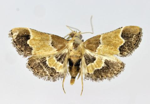 Endotricha luteogrisalis